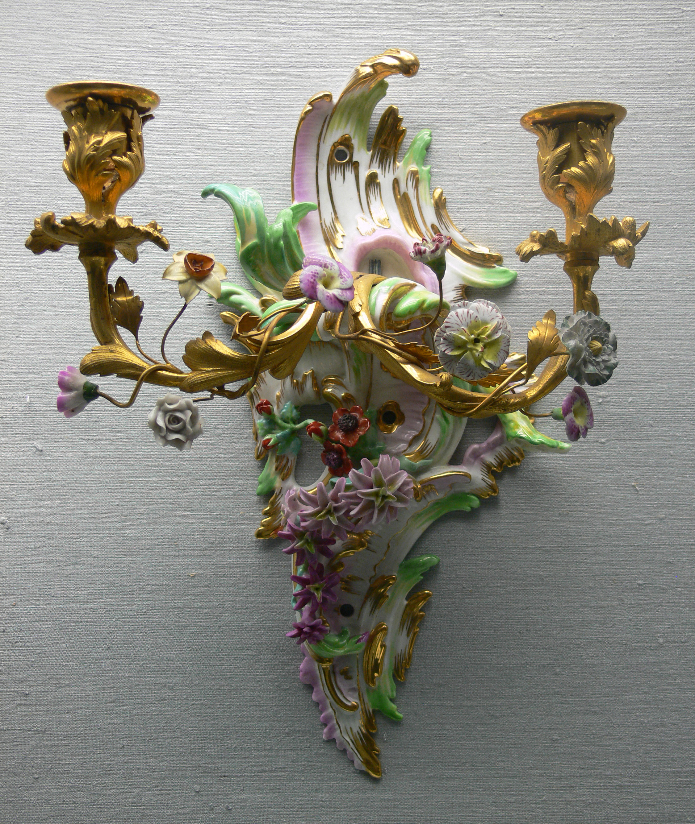 Einer von zwei Wandleuchtern mit Rocailleformen mit Blumen, Leuchterarme aus Bronze (vergoldet); Königliche Porzellan-Manufaktur Berlin, um 1770 Kunstgewerbemuseum Berlin, Inv. Nr. W-1996,43 (Paar)